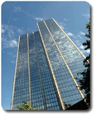 Zdjęcie przedstawiające główną siedzibę organizacji GS!